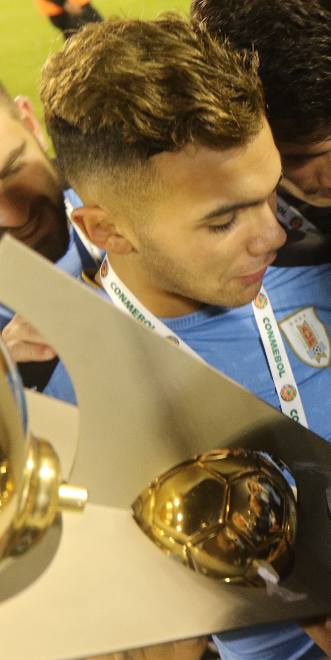 Quito 11 Feb (Andes).- Festejos y celebraciones por el triunfo del campeonato sudamericano de fútbol sub 20. La celeste uruguaya festejó la victoria del campeonato con gran emotividad. Fotografías: Carlos Rodríguez/Andes.